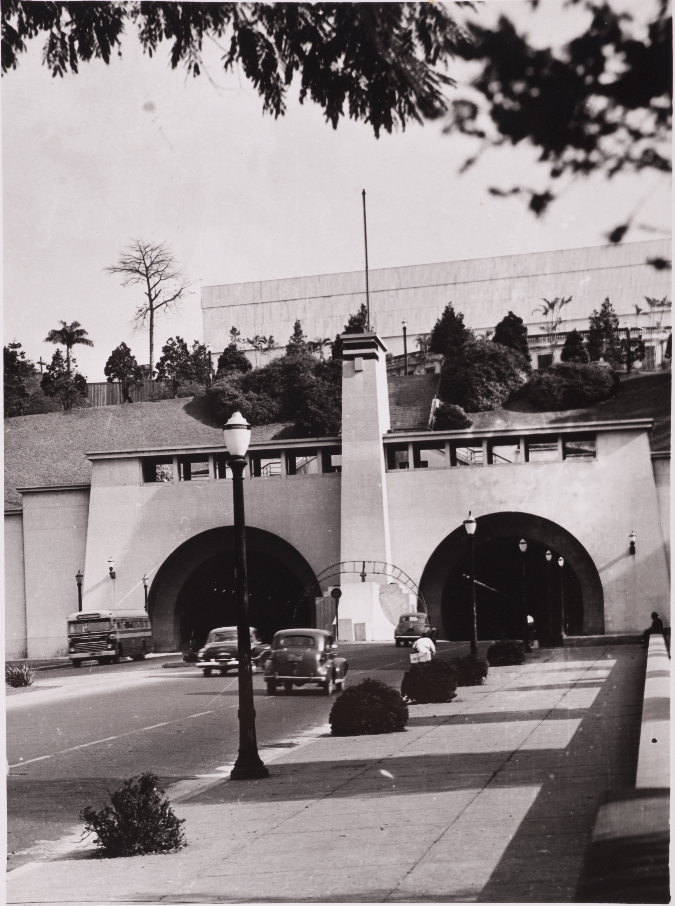 Obra que integra o acervo do Museu Paulista da USP. Coleção Werner Haberkorn - CHW